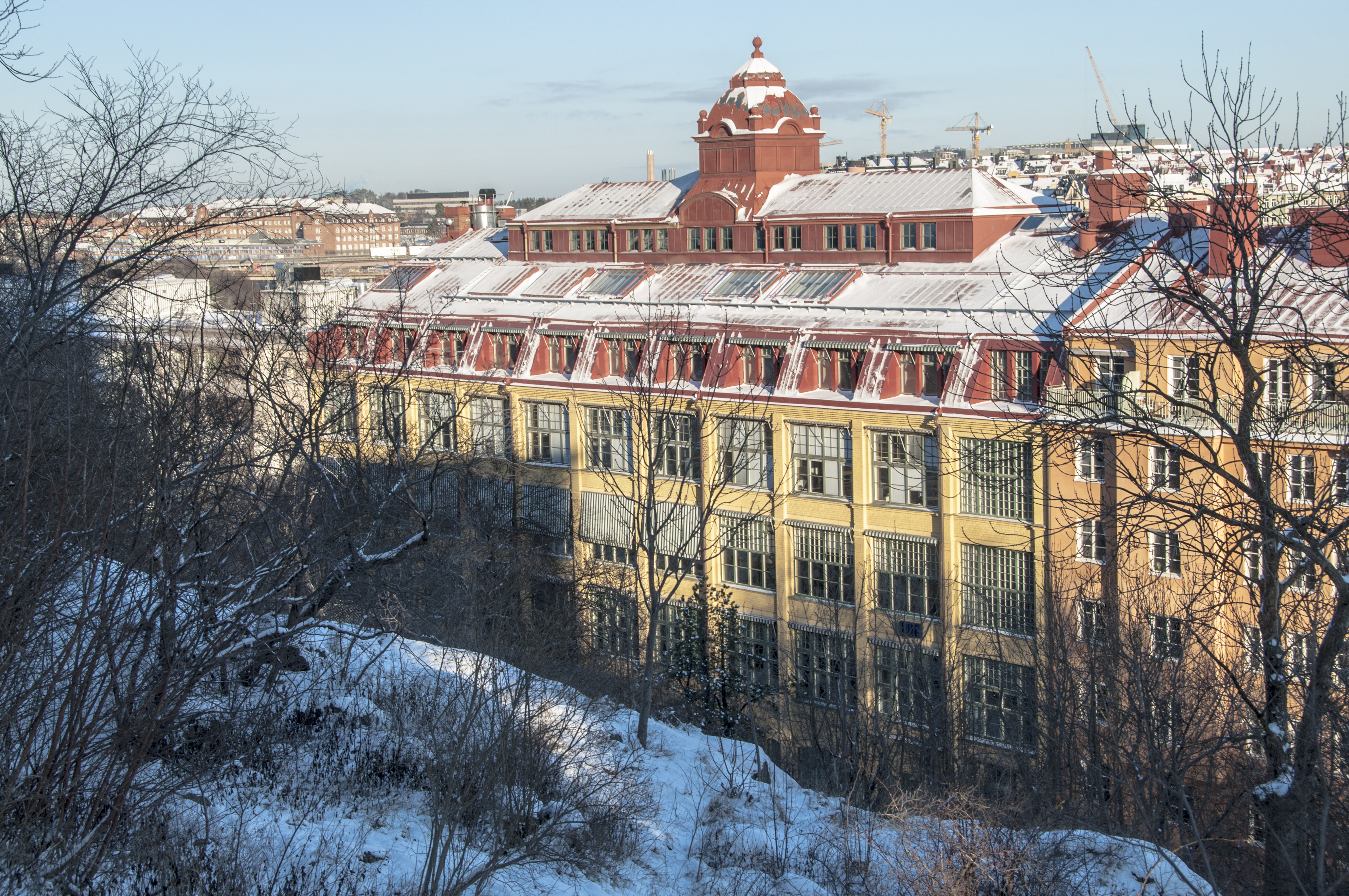 Isbrytaren 50, Igeldammsgatan 22, Nybyggnadsår 1917 - 1920, Cyrillus Johansson (Arkitekt) Pump-separator AB (Byggherre)